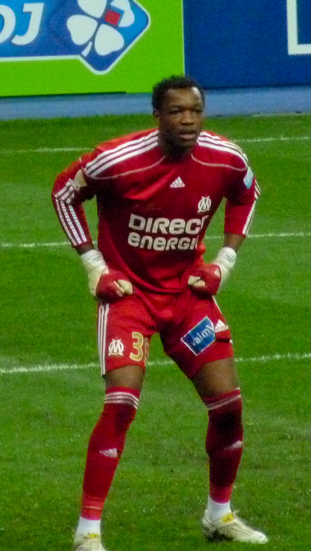 Finale de la coupe de la ligue - OM vs Bordeaux 3-1 - Stade de France - 27 mars 2010